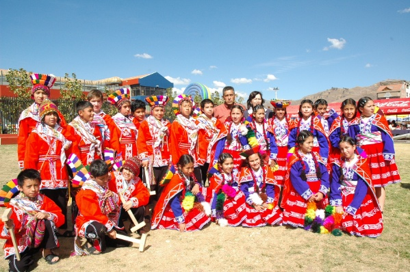 (Original) Niños de la sierra peruana en Cusco